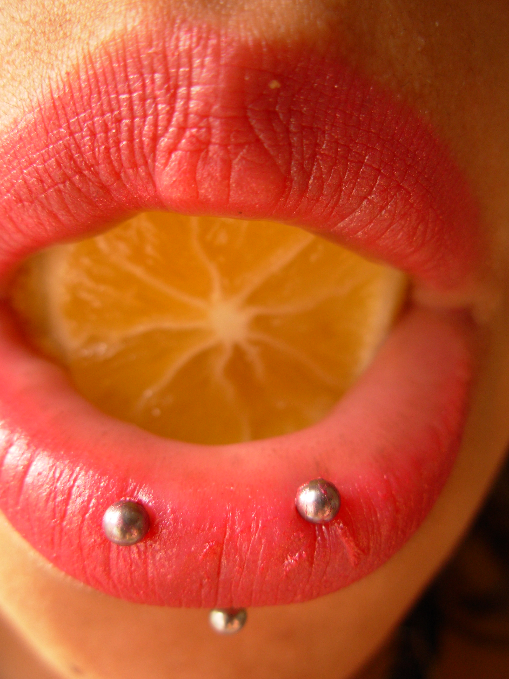 Labret piercing.